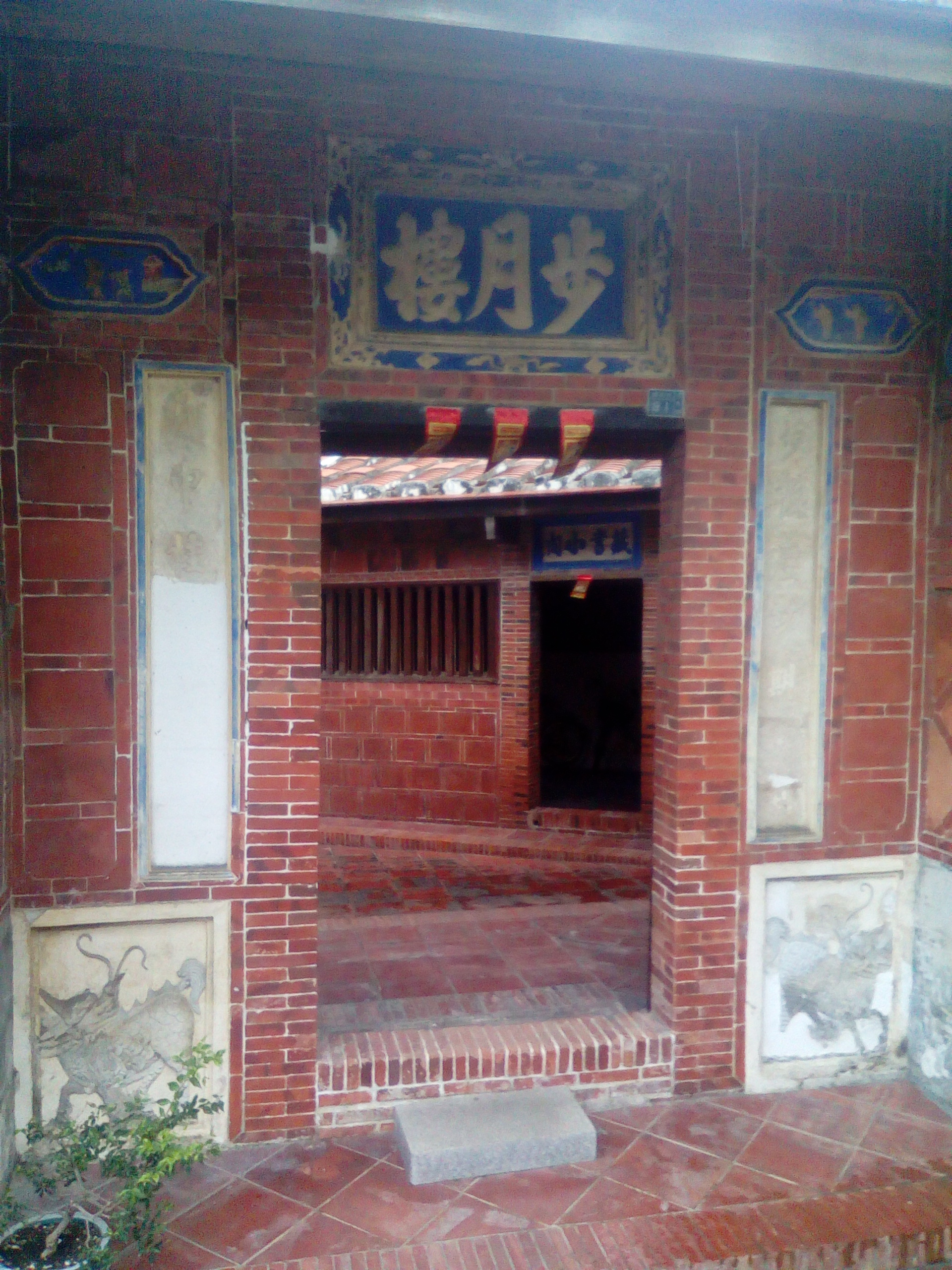 鄉內的三級古蹟